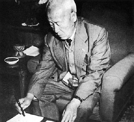 Syngman Rhee in 1948